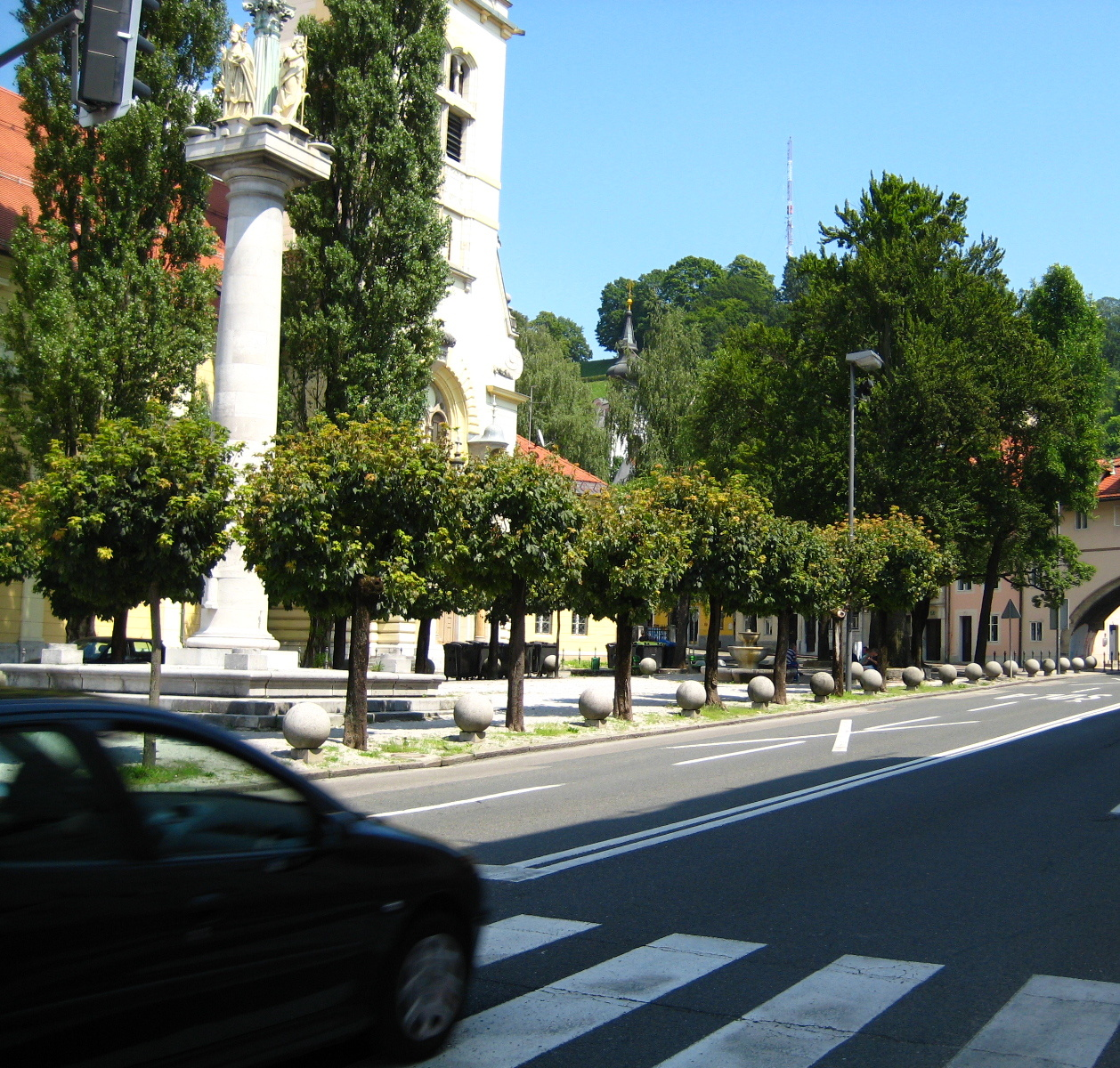 Ljubljana